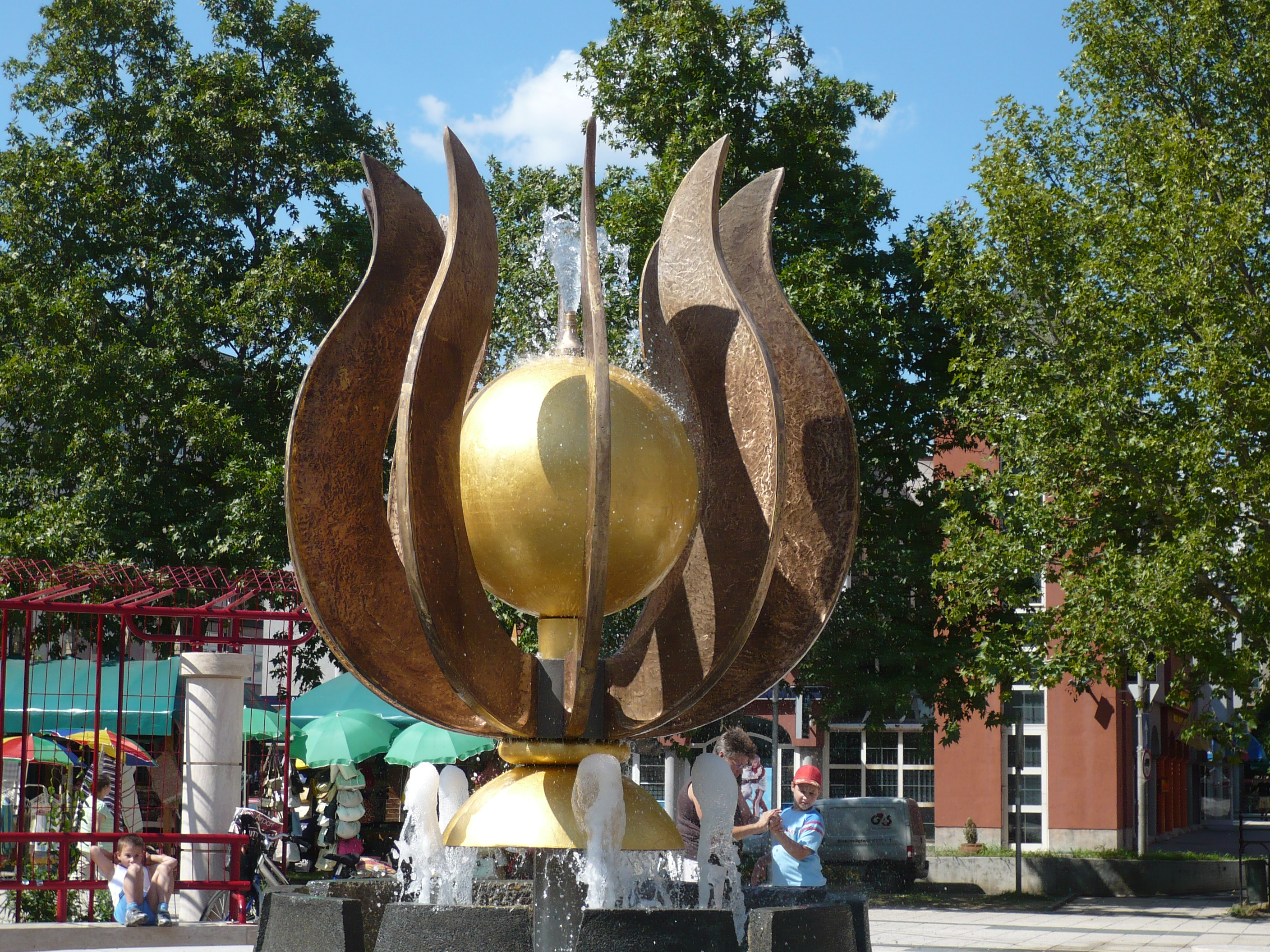 Cxefplaco en Zalaegerszeg